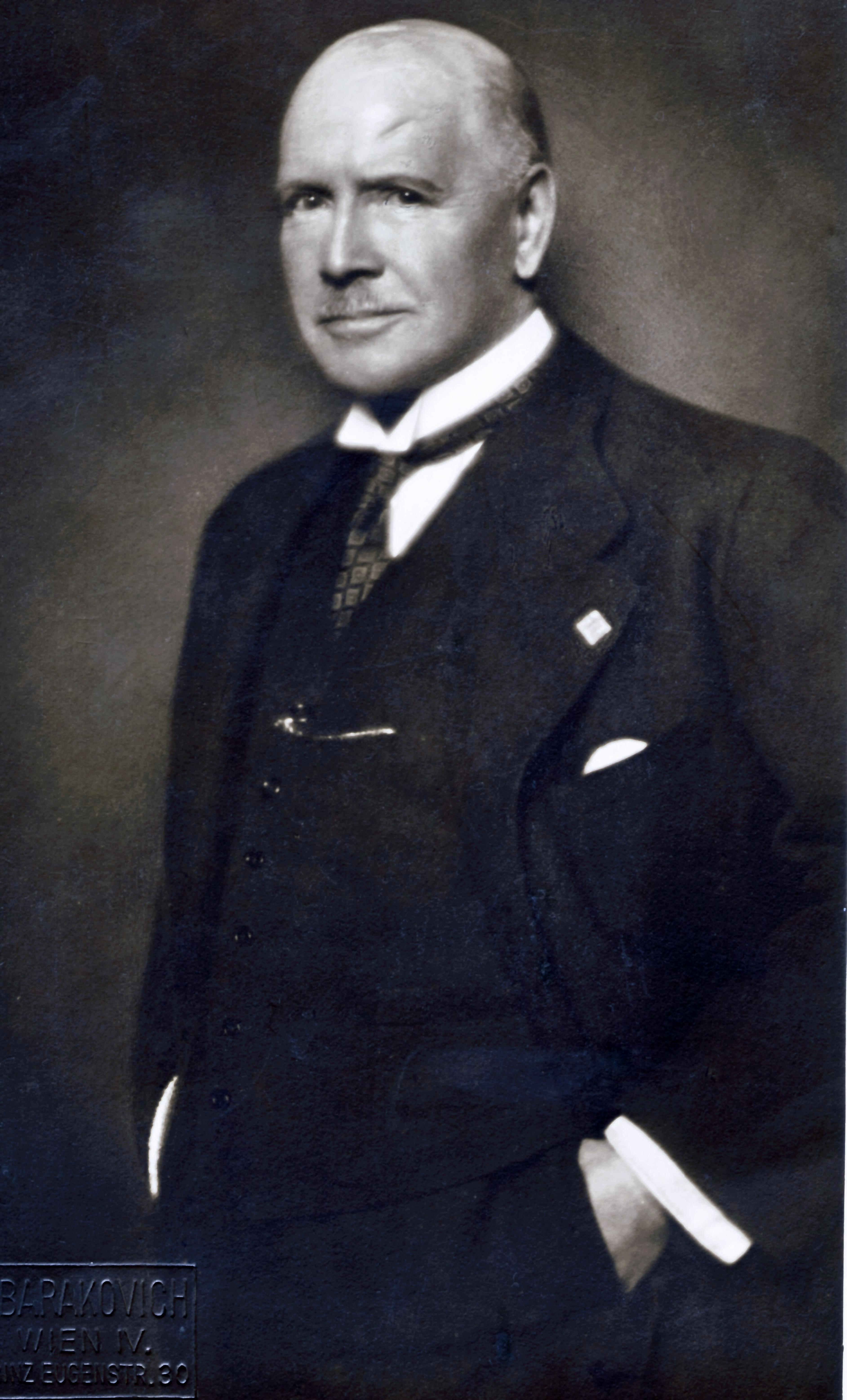 Fotografie von Adolf Cluss (1862–1930).